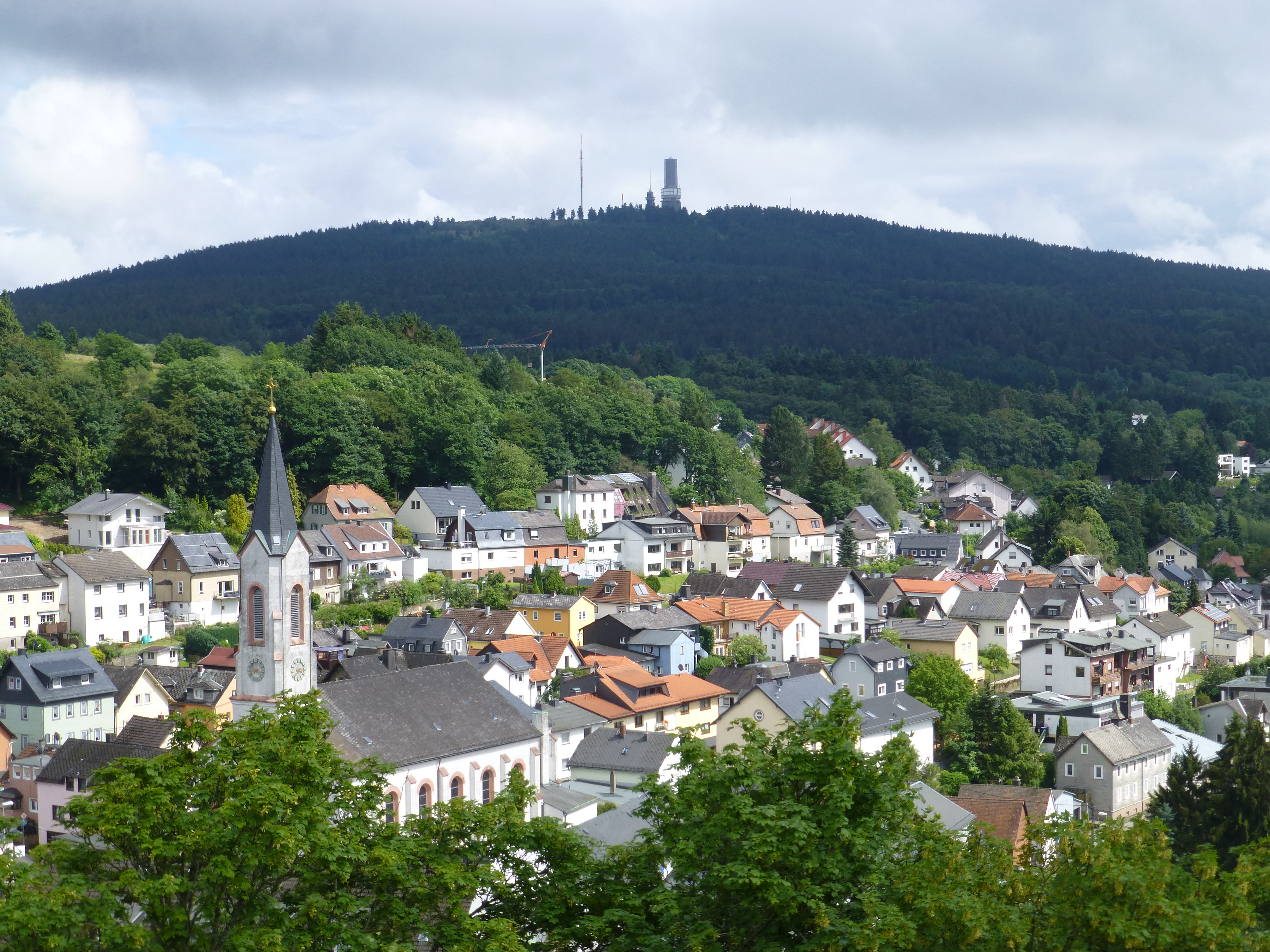 Oberreifenberg mit Großem Feldberg; Blick vom Wohnturm der Burg Reifenberg